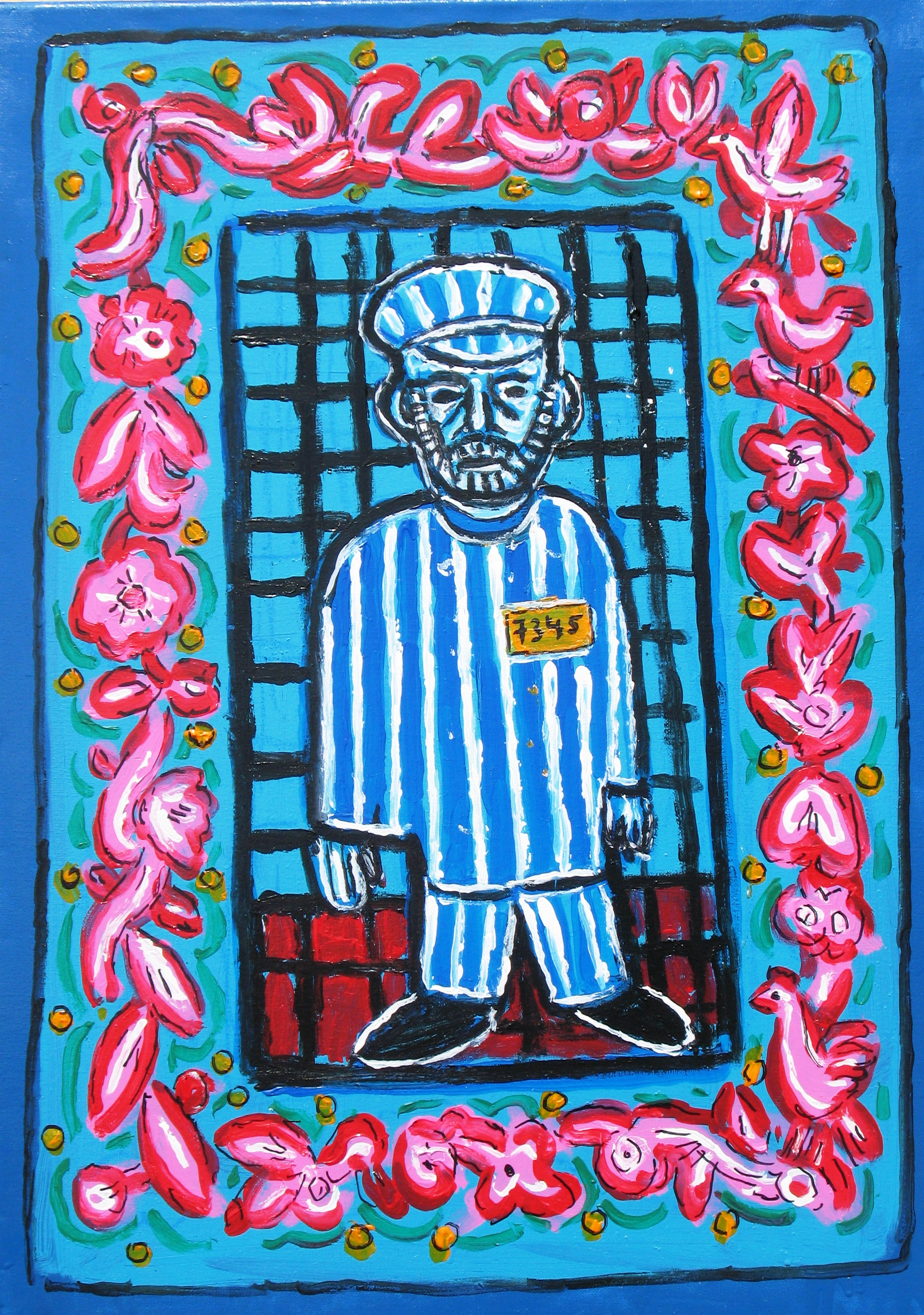 פורטרט עצמי במדי מחנה הריכוז